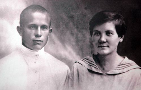 Никита Сергеевич Хрущев и Нина Петровна Кухарчук. Украинская ССР, 1924 г.